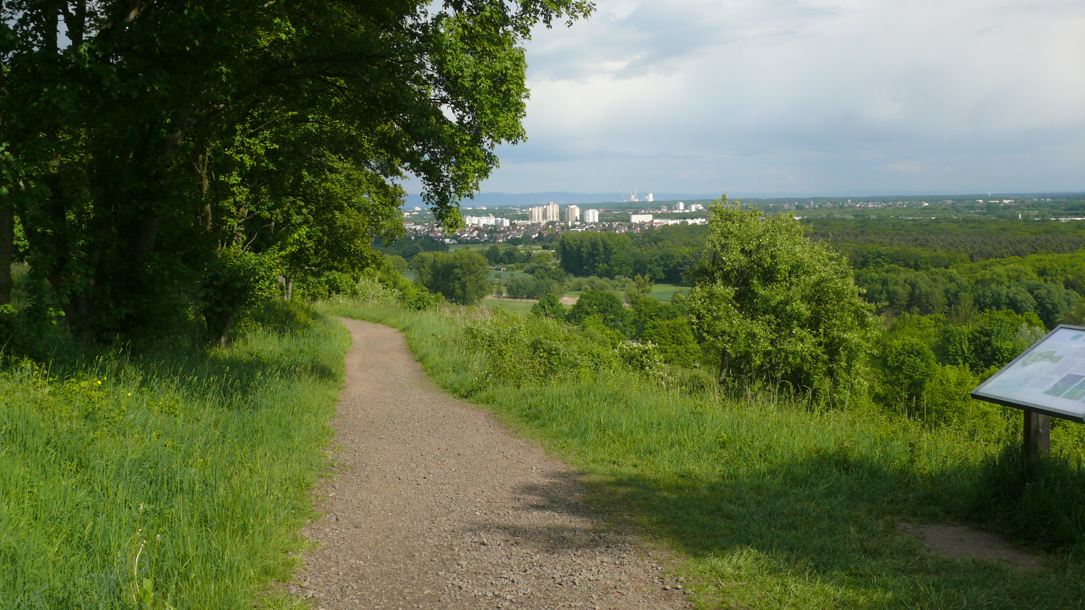 Blick auf Bischofsheim